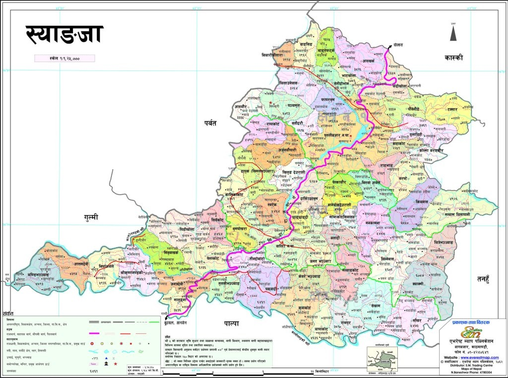 नेपाली: स्याङ्गजा जिल्लाका गाउँ विकास समितिहरू